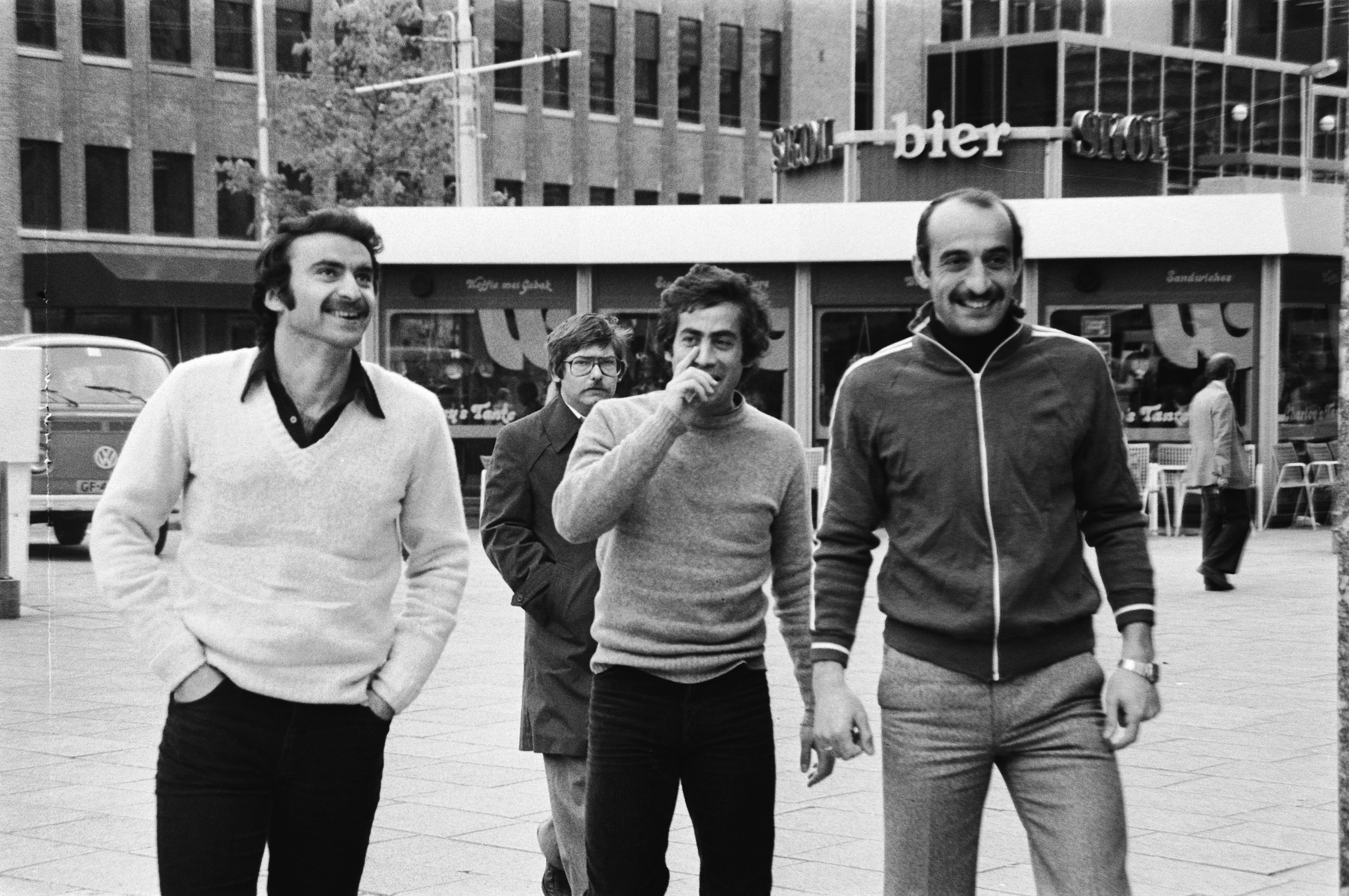 Morgen speelt Feyenoord tegen Dynamo Tiflis om de Europacup-II, de top van Dynamo Tiflis v.l.n.r. Chivadz Gutzaev en Kipiani